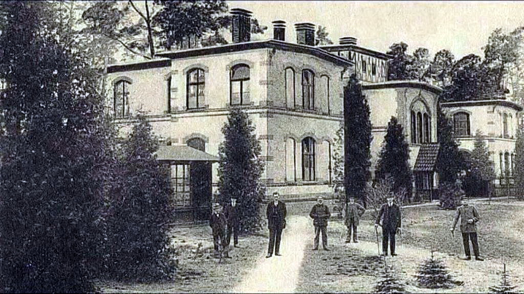 Кухня и прачечная первого этапа строительства комплекса Грабовзее.